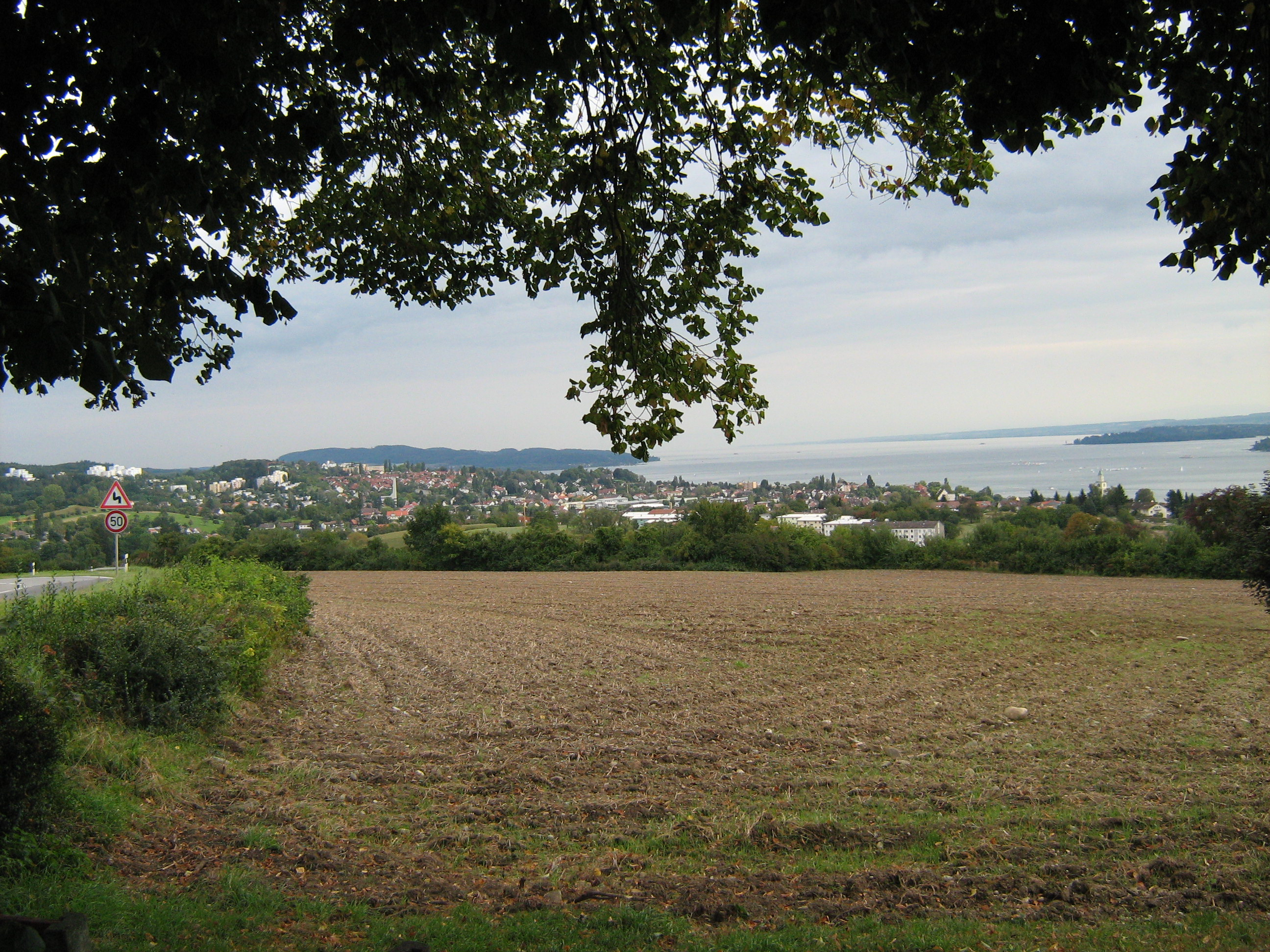 Panorama-Bild von Überlingen am Bodensee